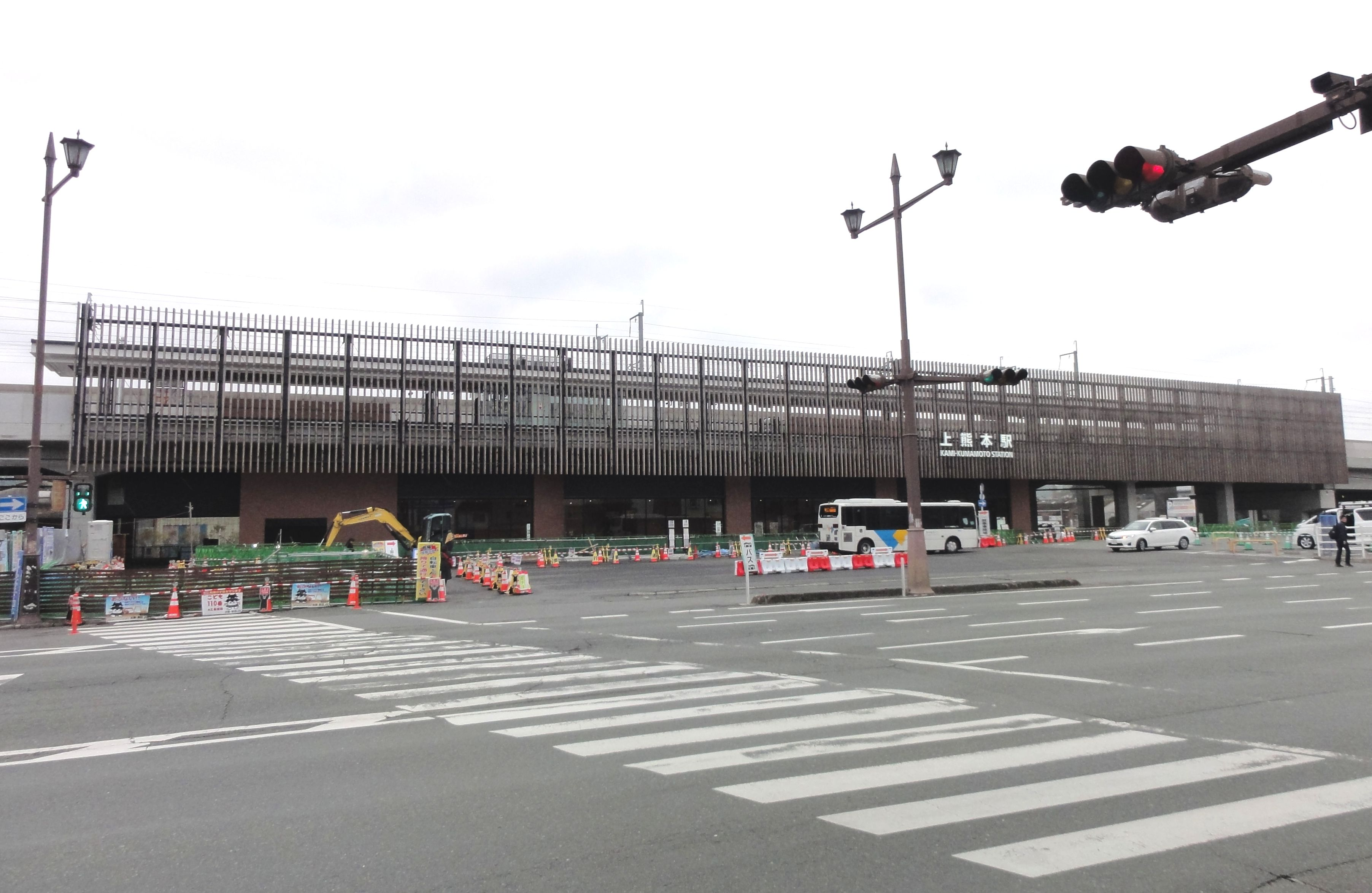 JR上熊本駅